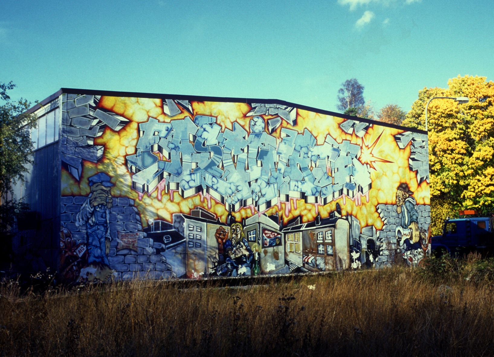 Målningen ”Fascinate” täcker hela baksidan av fastigheten i det sydöstra hörnet av Borghöjdsvägen och Winquists väg i Spånga. Den gjordes sommaren 1989 med tillstånd från fastighetsägaren. De två upphovsmännen Circle och Tariq var bara tonåringar men betraktades redan då som några av de främsta graffitikonstnärerna i Sverige. Tariq var specialiserad på figurer och Circle på text. ”Fascinate” mäter ungefär tretton gånger åtta meter och målningen var deras absolut största verk. Vid tiden var den förmodligen också den största graffitimålningen i Sverige. Idag är nederdelen förstörd, men i övrigt är målningen i förhållandevis gott skick. Den tidigare tomma och gräsbevuxna tomten framför målningen är nu inhägnad och omvandlad till parkeringsplats. 2007 väcktes en fråga om byggnadsminnesförklaring för att möjliggöra målningens bevarande. Frågan har ännu inte avgjorts hos Länsstyrelsen. Stockholms stadsmuseum anser att målningen är värdeful och att det är önskvärt att den bevaras.